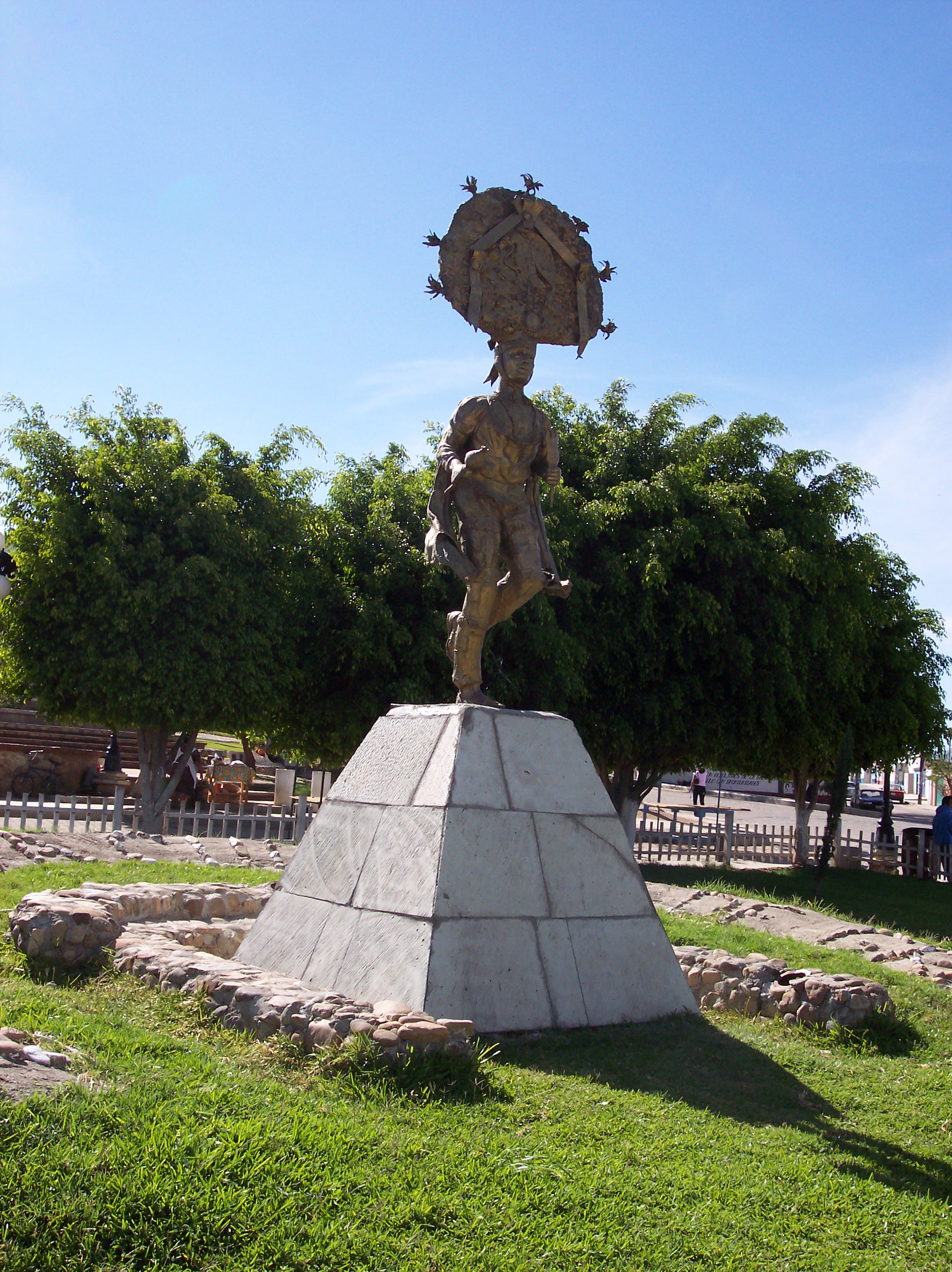 Dancer statue in the main park of Cuilapam de Guerrero.Town, Oaxaca, México. From image Convento_Santiago_Apóstol_letreroDañado-Cuilapam_de_Guerrero_Oaxaca_Mexico.jpg we can get more information about Culiapam de Guerrero.